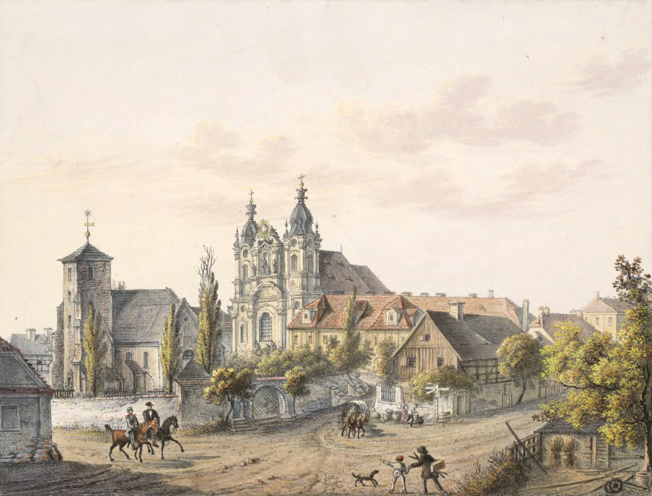 Wahlstatt im 19. Jahrhundert.